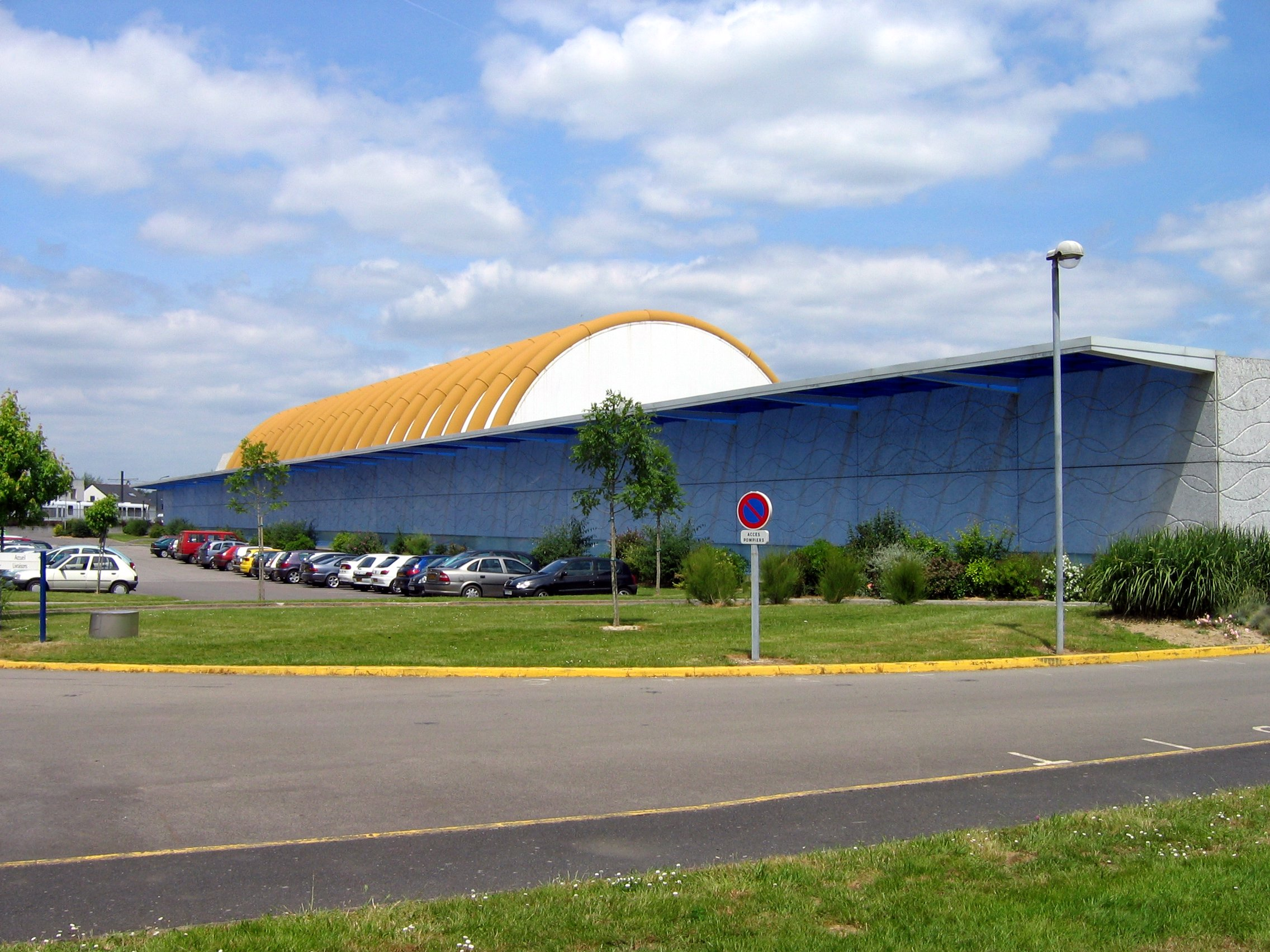 Batiment abritant le bassin des carènes de l'Ecole Centrale de Nantes